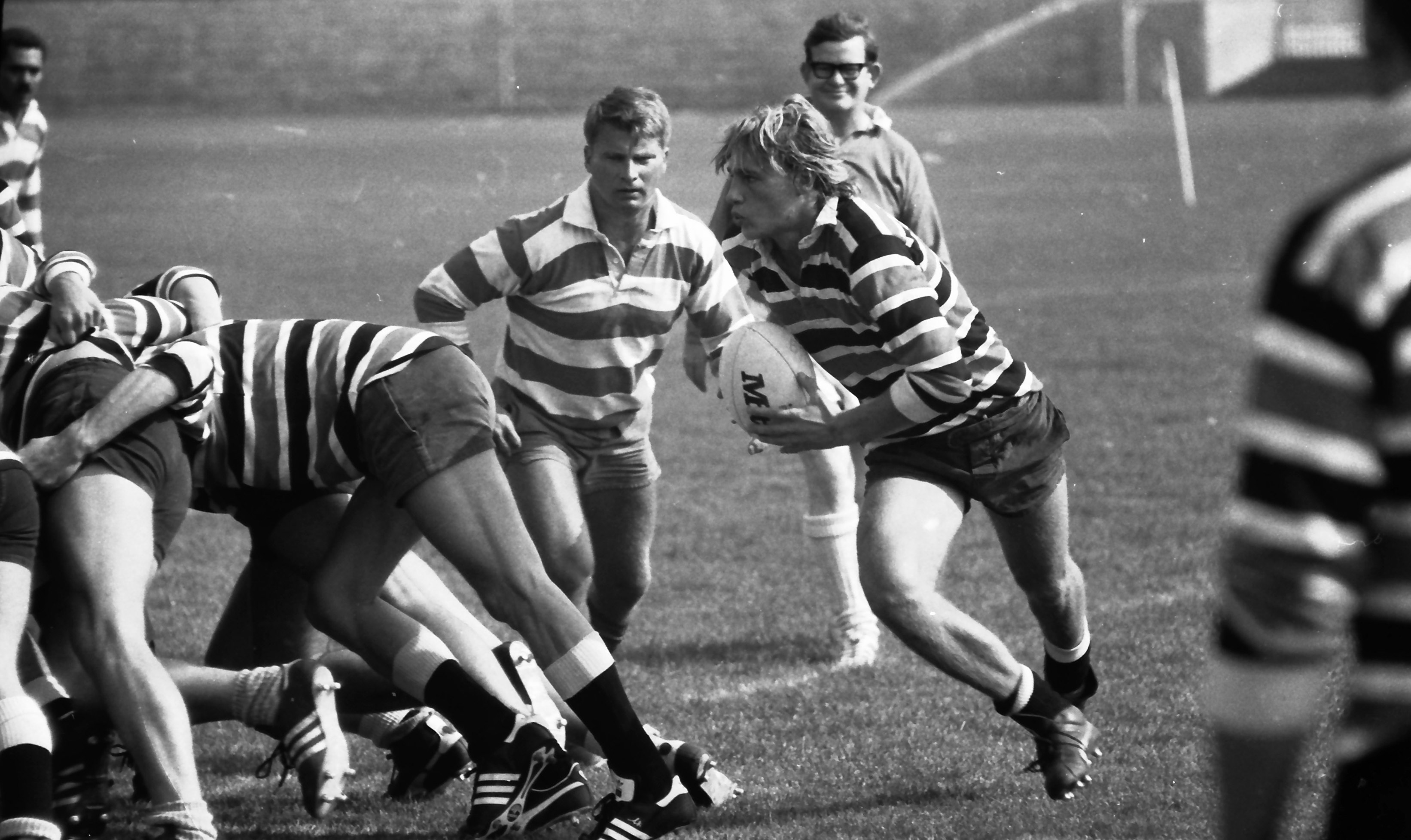 Ingolf Cartsburg als Gedrängehalb für den Berliner Rugby-Club im Einsatz gegen Yanks RFC auf dem Maifeld, Berlin, 80iger Jahre